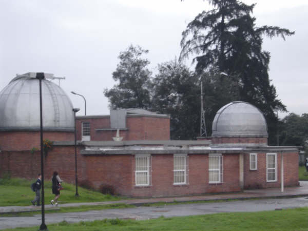 Observatorio Astronomico Nacional, ubicado en la ciudad Universitaria Edifico 413 Facultad de ciencias